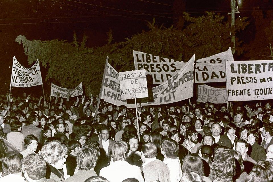 Manifestación en Trelew en octubre de 1972